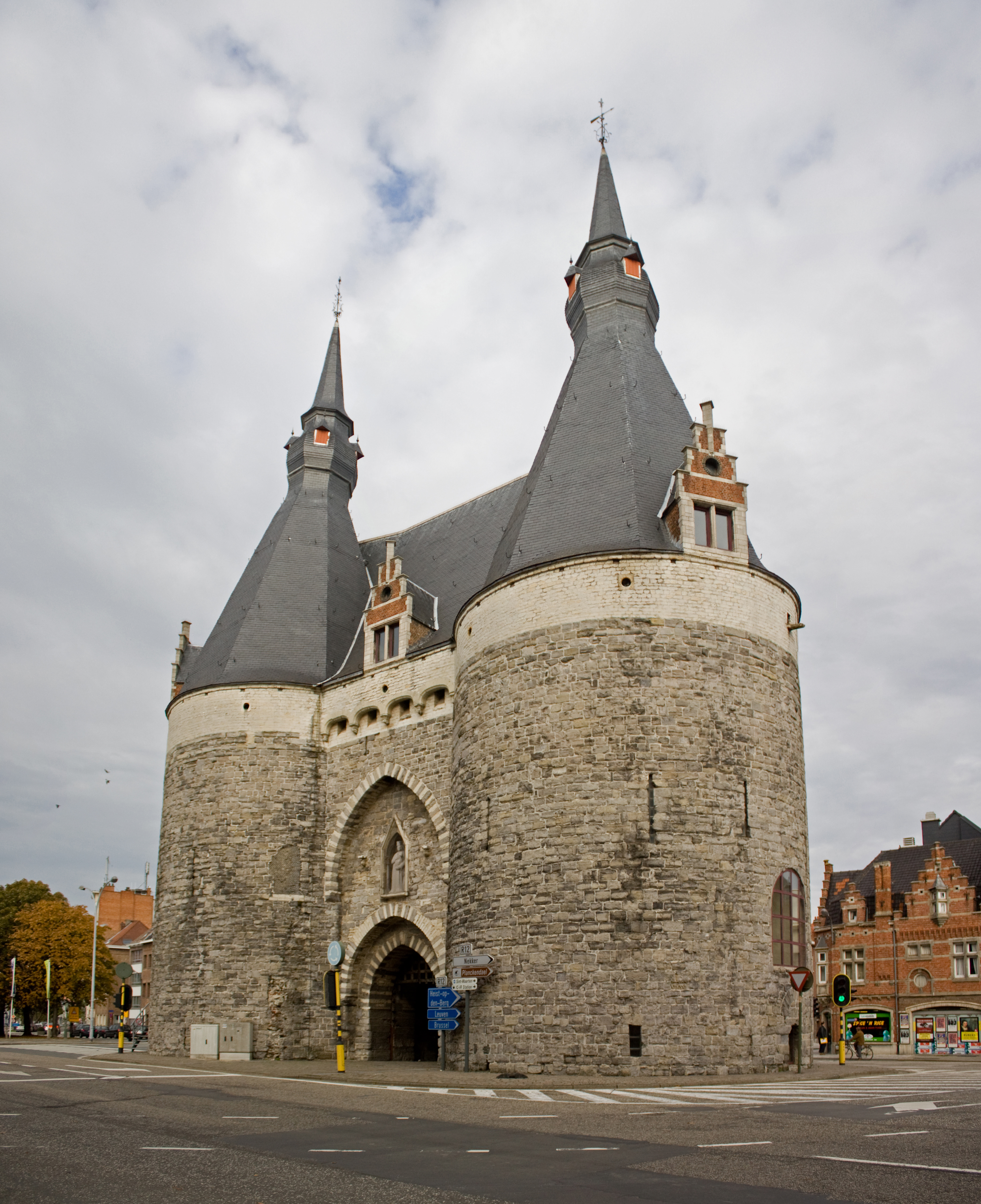 De Brusselsepoort te Mechelen